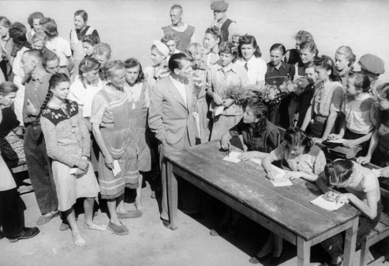 ADN-ZB-Donath Deutschland Frauen und Mädchen, die durch die Kriegswirren in sowjetische Kriegsgefangenschaft kamen, im Heimkehrlager Polte Nord, wo sie nach 14-tägiger Quarantäne in ihre Heimatorte entlassen wurden. Aufn. Aug. 1947